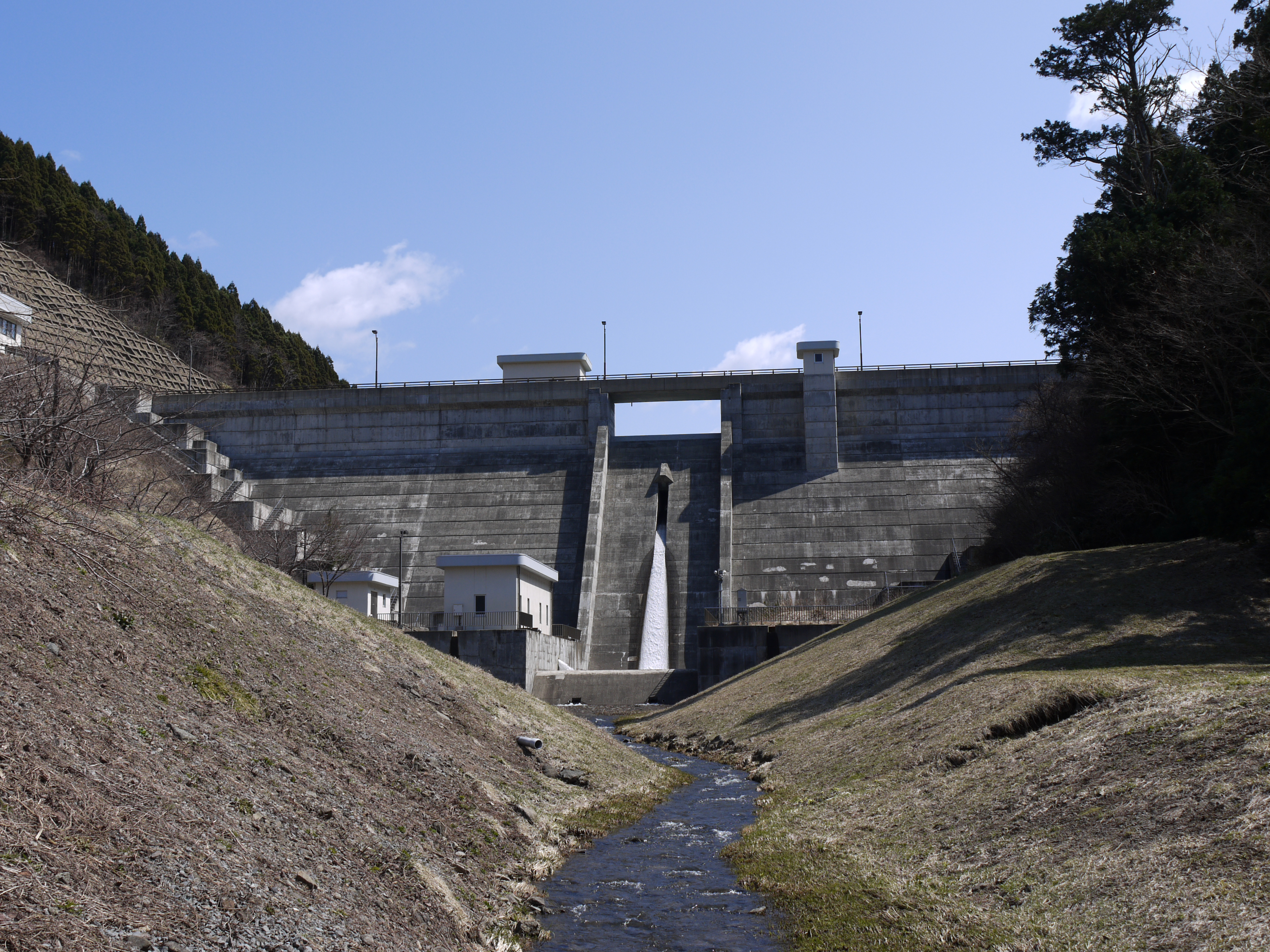 小泊ダム 堤体